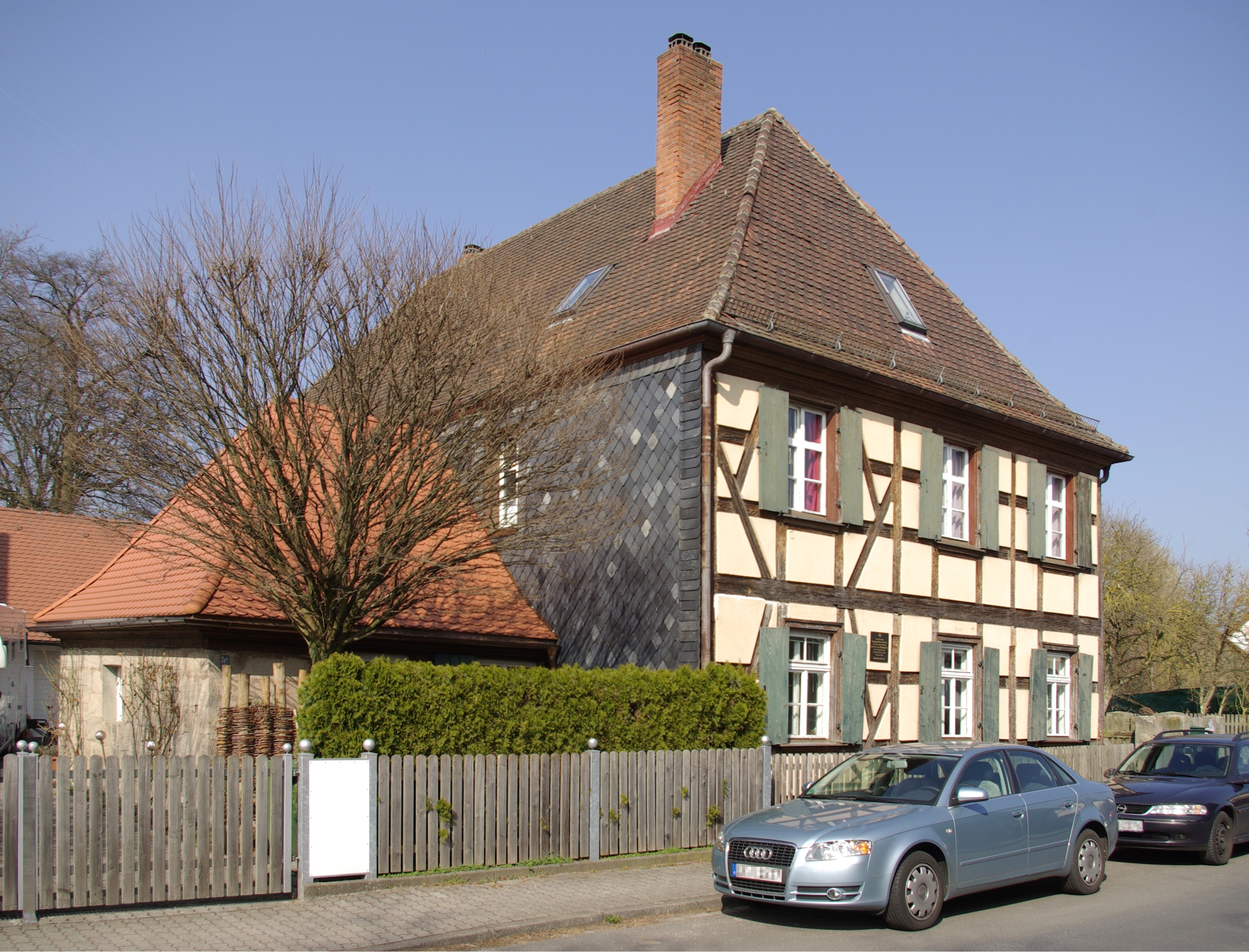 Das Dompropsteiliche (ab 1885 Königlich-Bayerische) Forsthaus. Das Haus wurde 1741 auf einem Vorgängerbau aus dem 16. Jahrhundert erbaut.